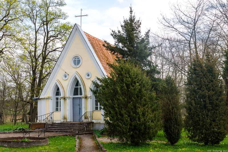 Свяцкі палац. Капліца